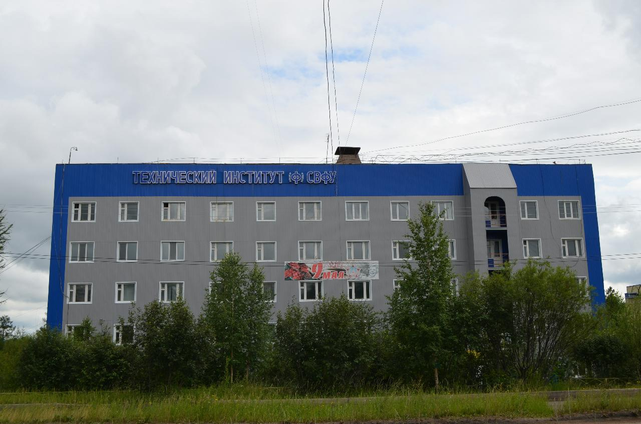 Нерюнгри. Учебно-лабораторный корпус ТИ (ф) СВФУ